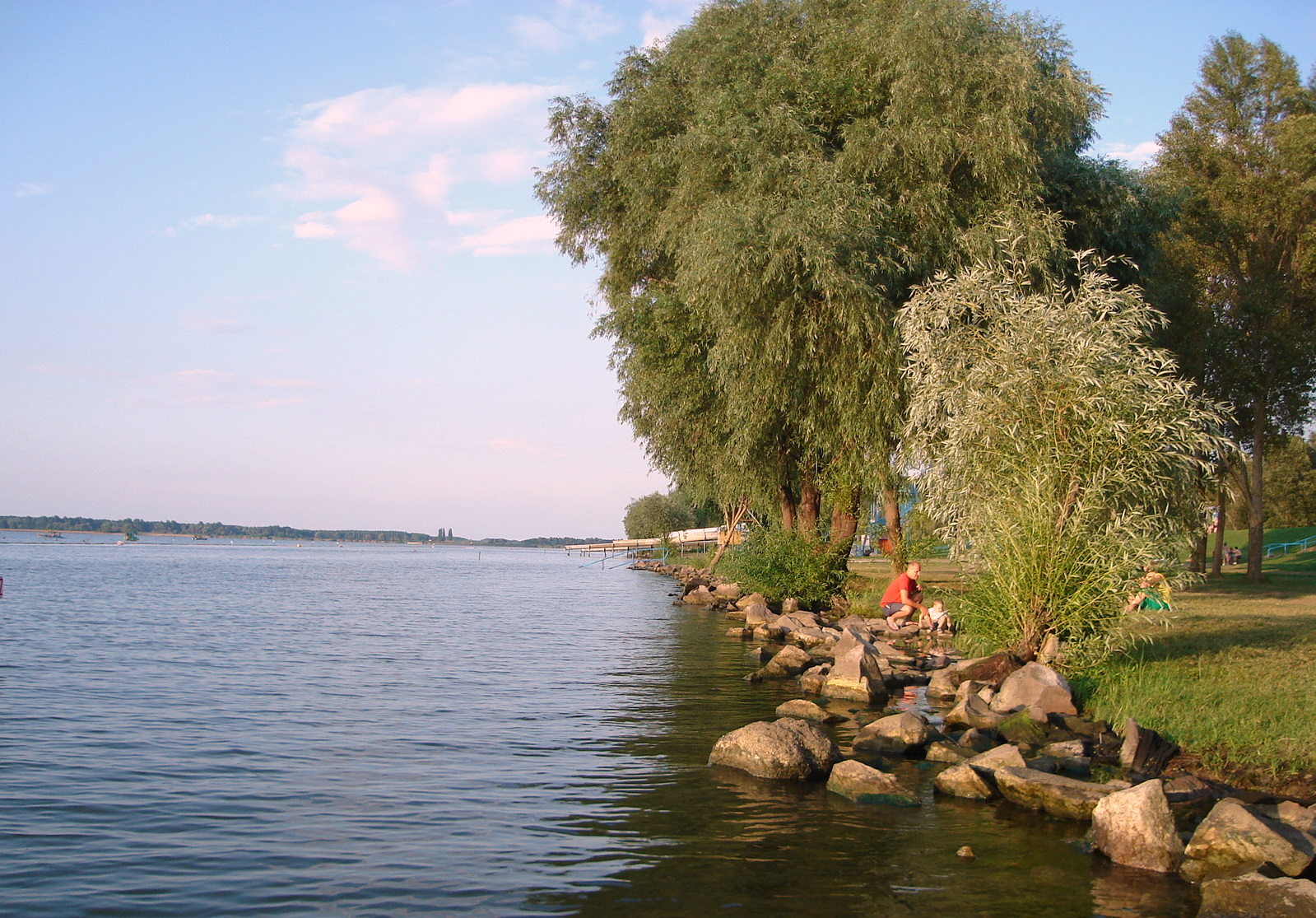 Tisza-tó részlete